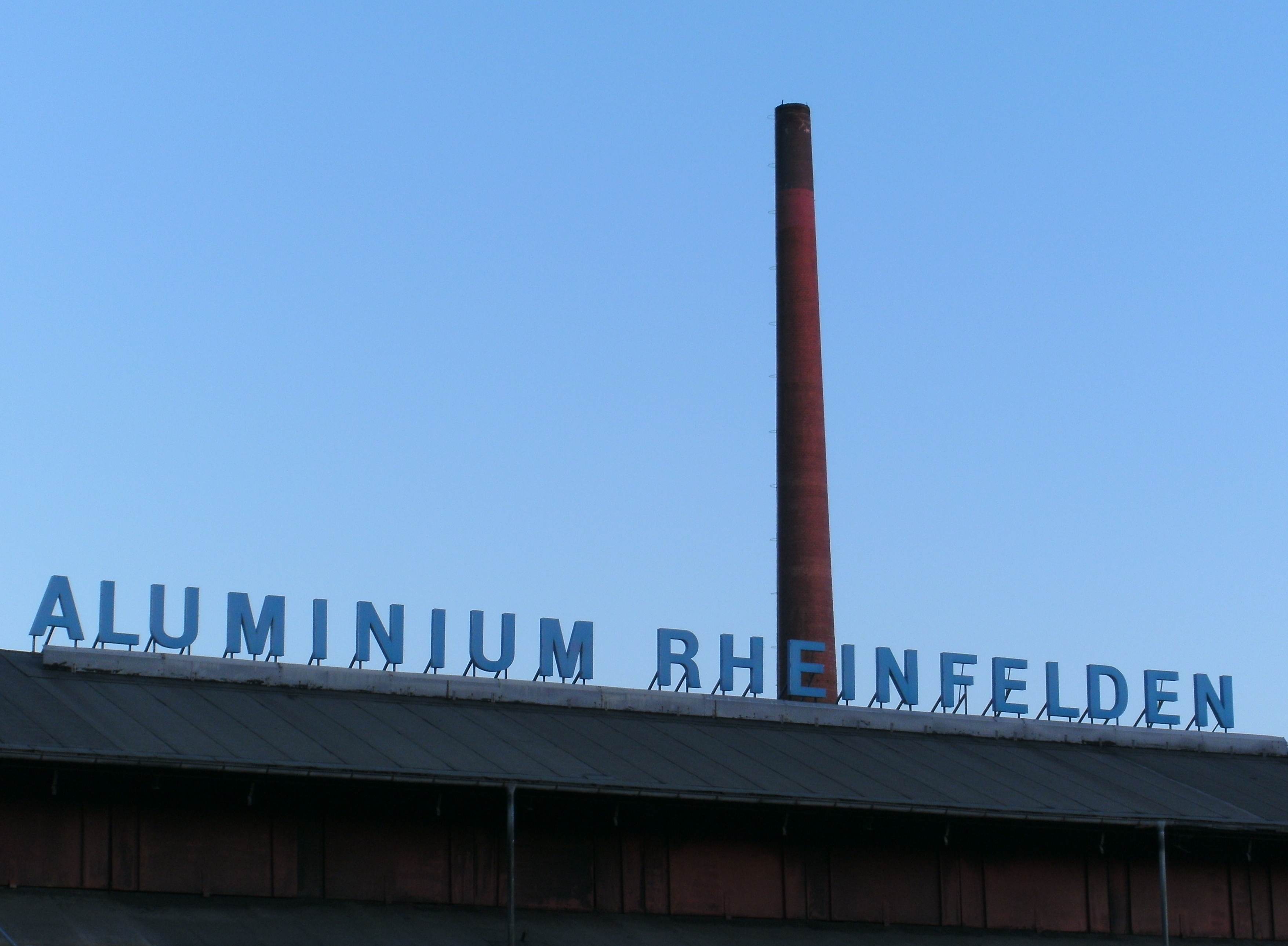 Schriftzug Aluminium Rheinfelden auf dem Dach einer Werkshalle am Unternehmenssitz Rheinfelden.